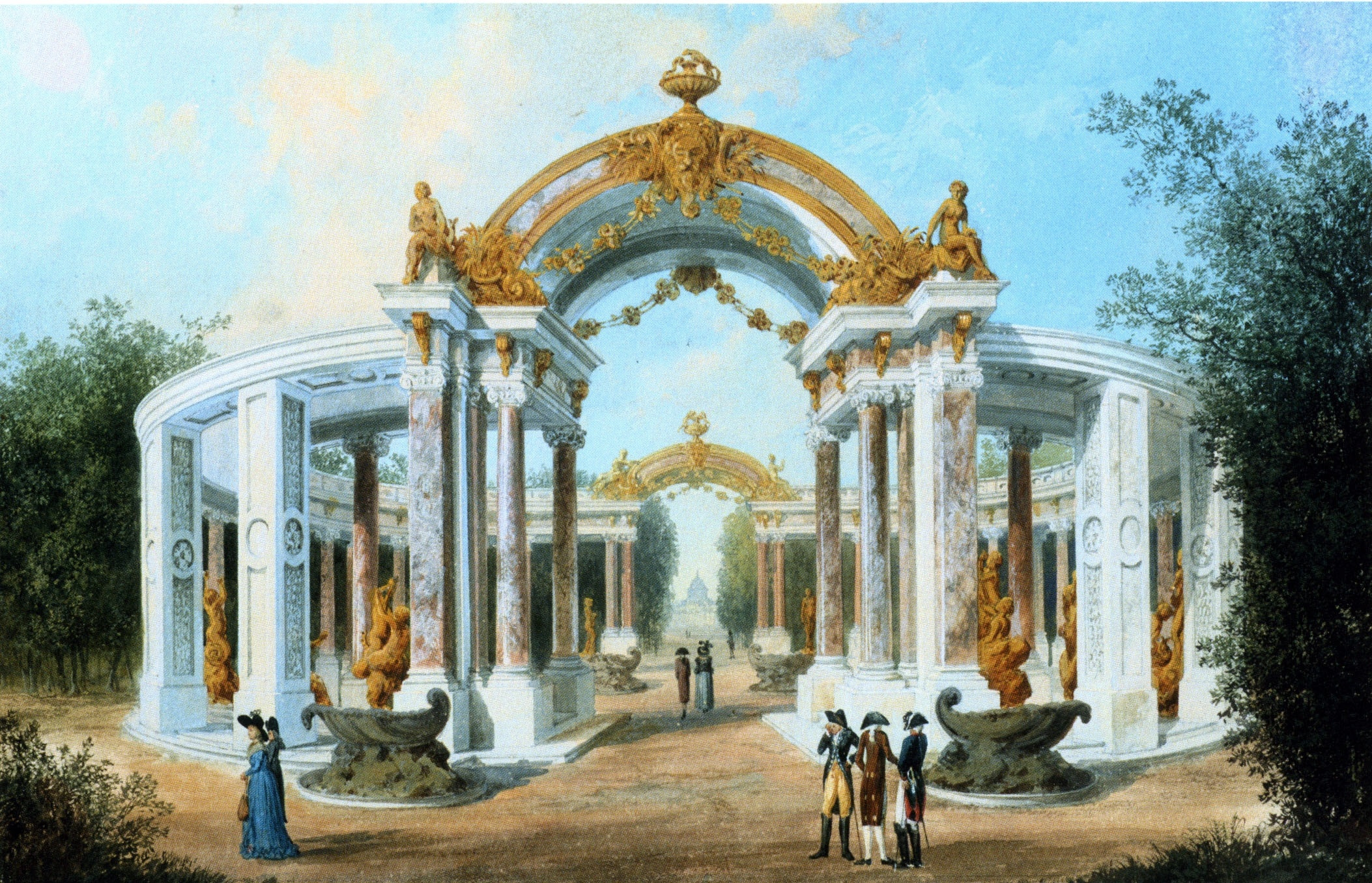 folgt der 1684 von Mansarde in Versailles geschaffenen Kolonnade